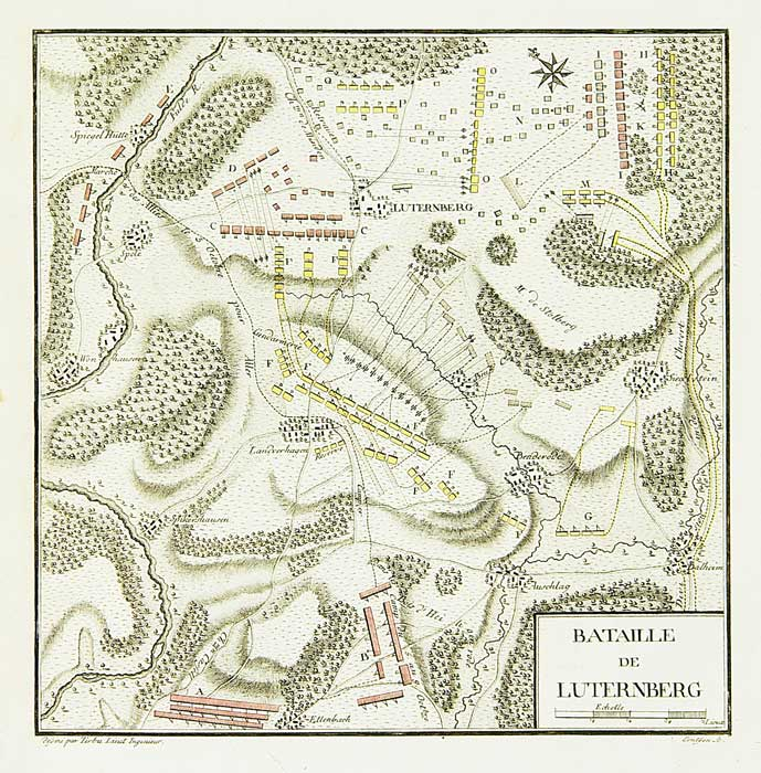 Схема сражения при Лутерберге 10.10.1758